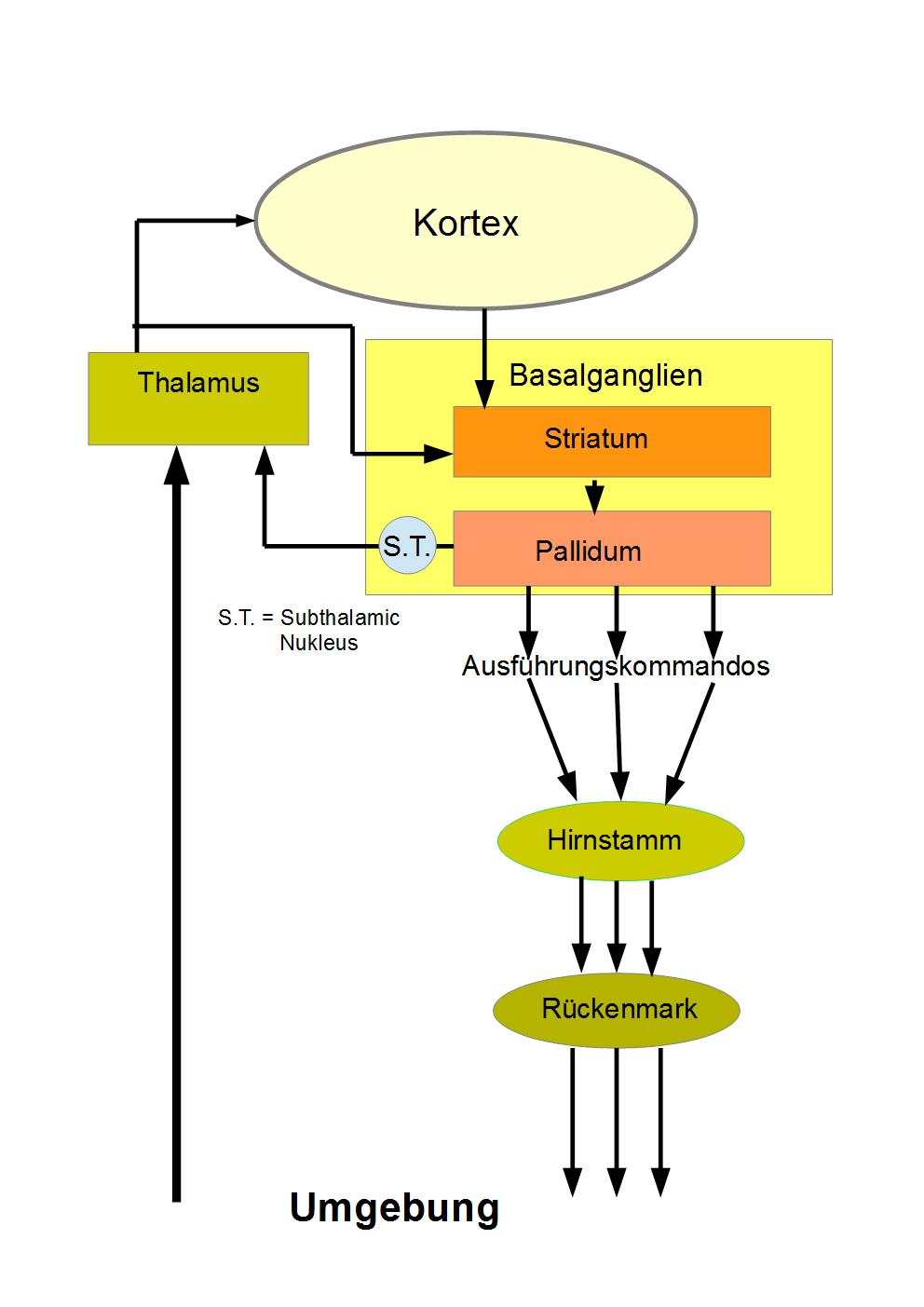 Informationswege in den Basalganglien